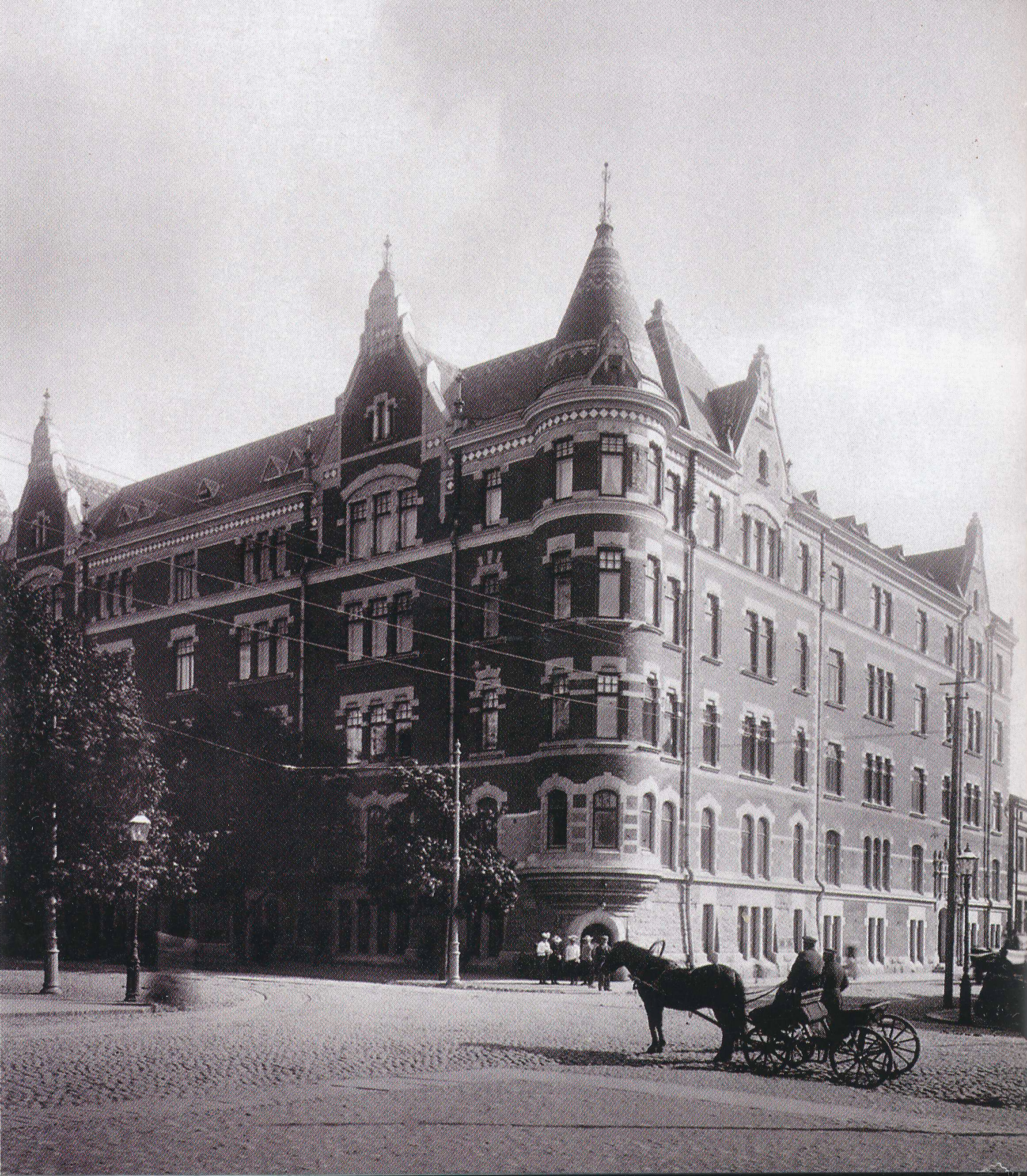 Asuintalo "Falken" Helsingin Bulevardin ja Albertinkadun kulmassa (Bulevardi 30), luultavasti vuonna 1900.